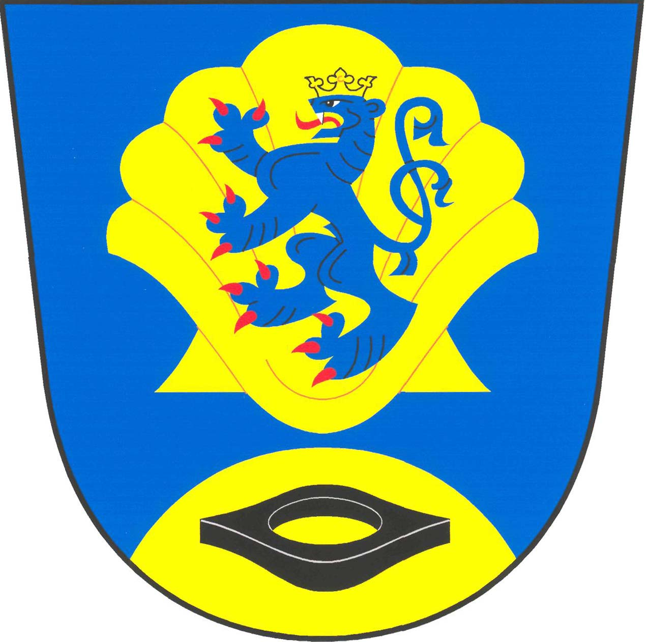 Znak obce Kadlín